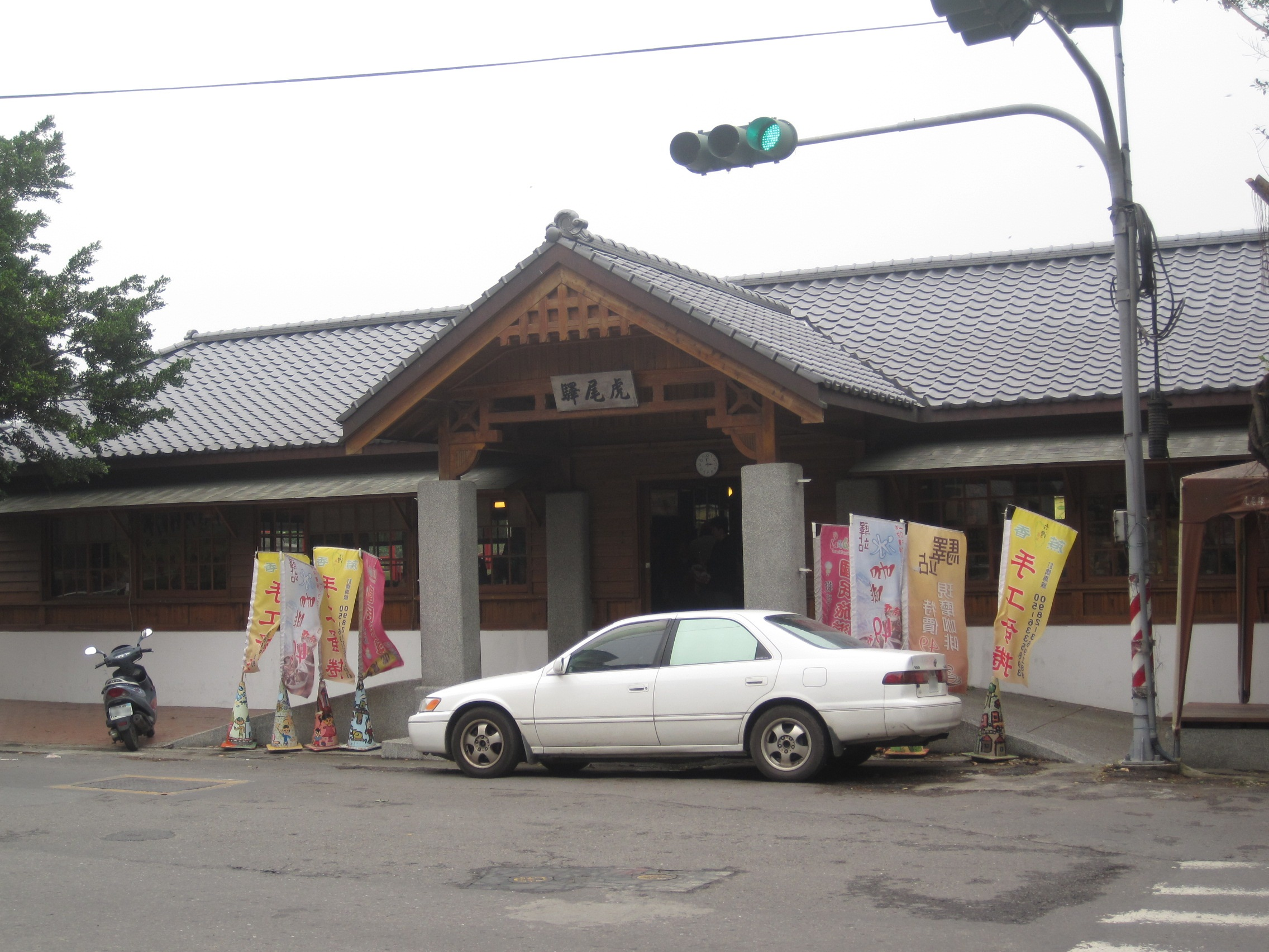 虎尾驛，昔日的糖鐵車站